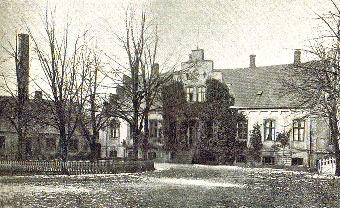 Boltinggaard er en lille hovedgård, som er dannet af landsbyen Boltinge i 1589 af Peder Thott. Gården ligger i Ringe Sogn, Gudme Herred, Faaborg-Midtfyn Kommune. Hovedbygningen er opført i 1854.